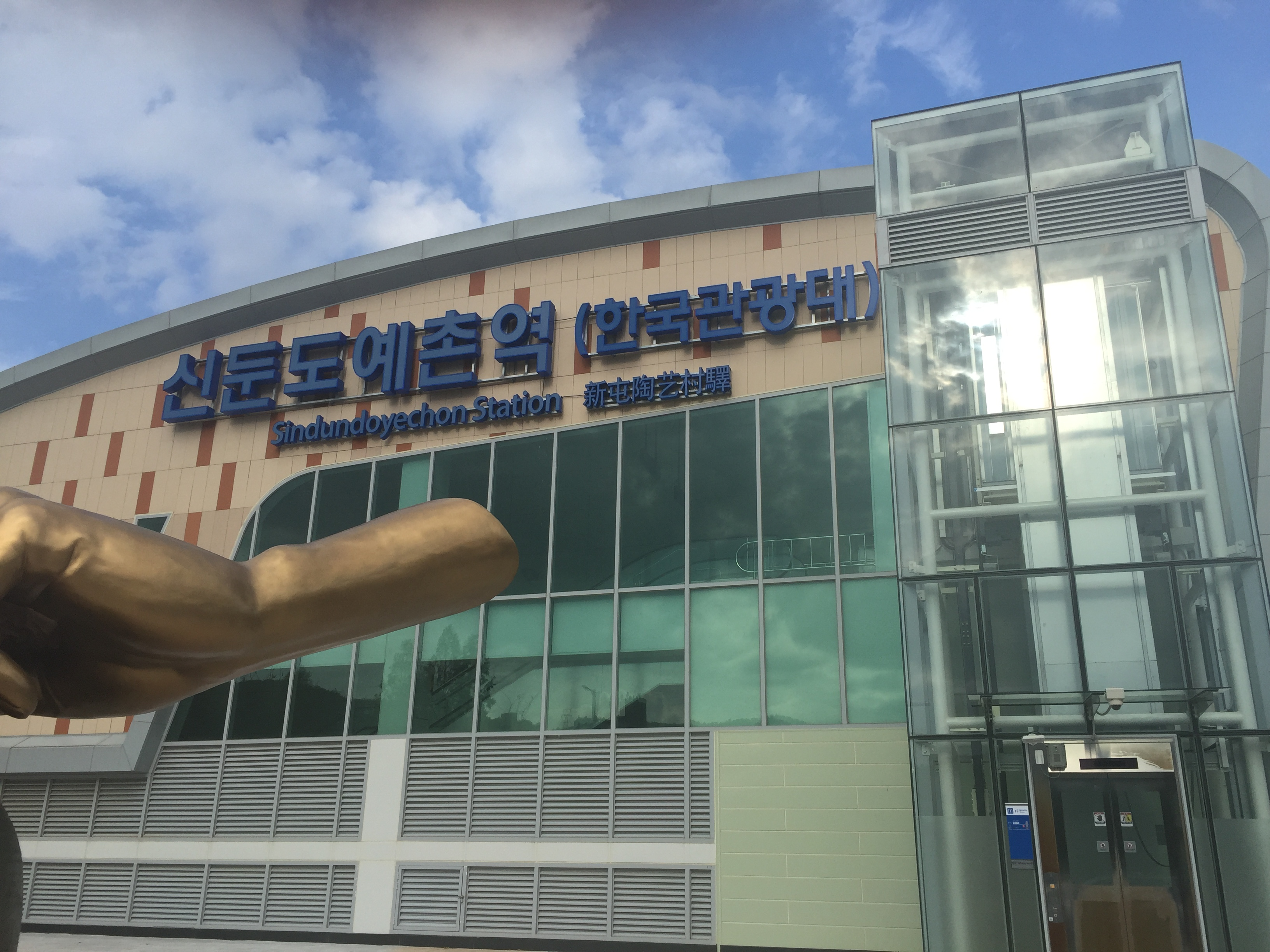 신둔도예촌 외부입니다.